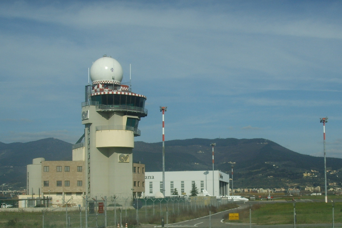 Torre di controllo dell'Aeroporto di Firenze.